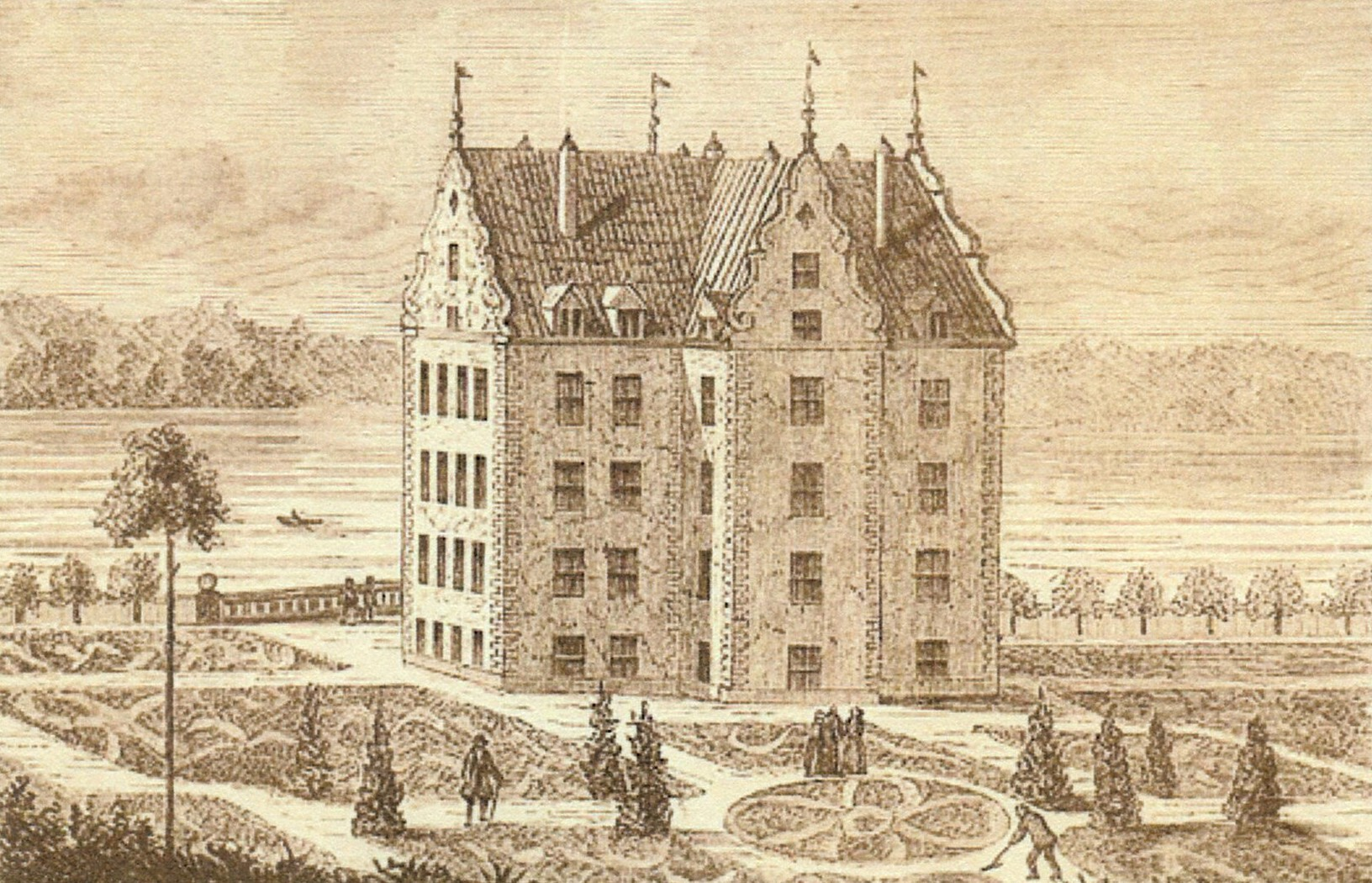 Tynnelsö slott i Strängnäs kommun på en illustration från 1889